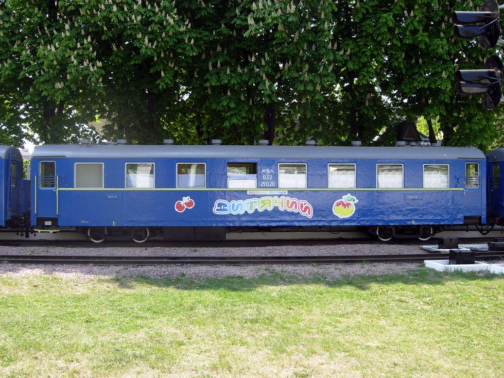 Київська дитяча залізниця. Вагон «Pafawag» на станції «Вишенька»